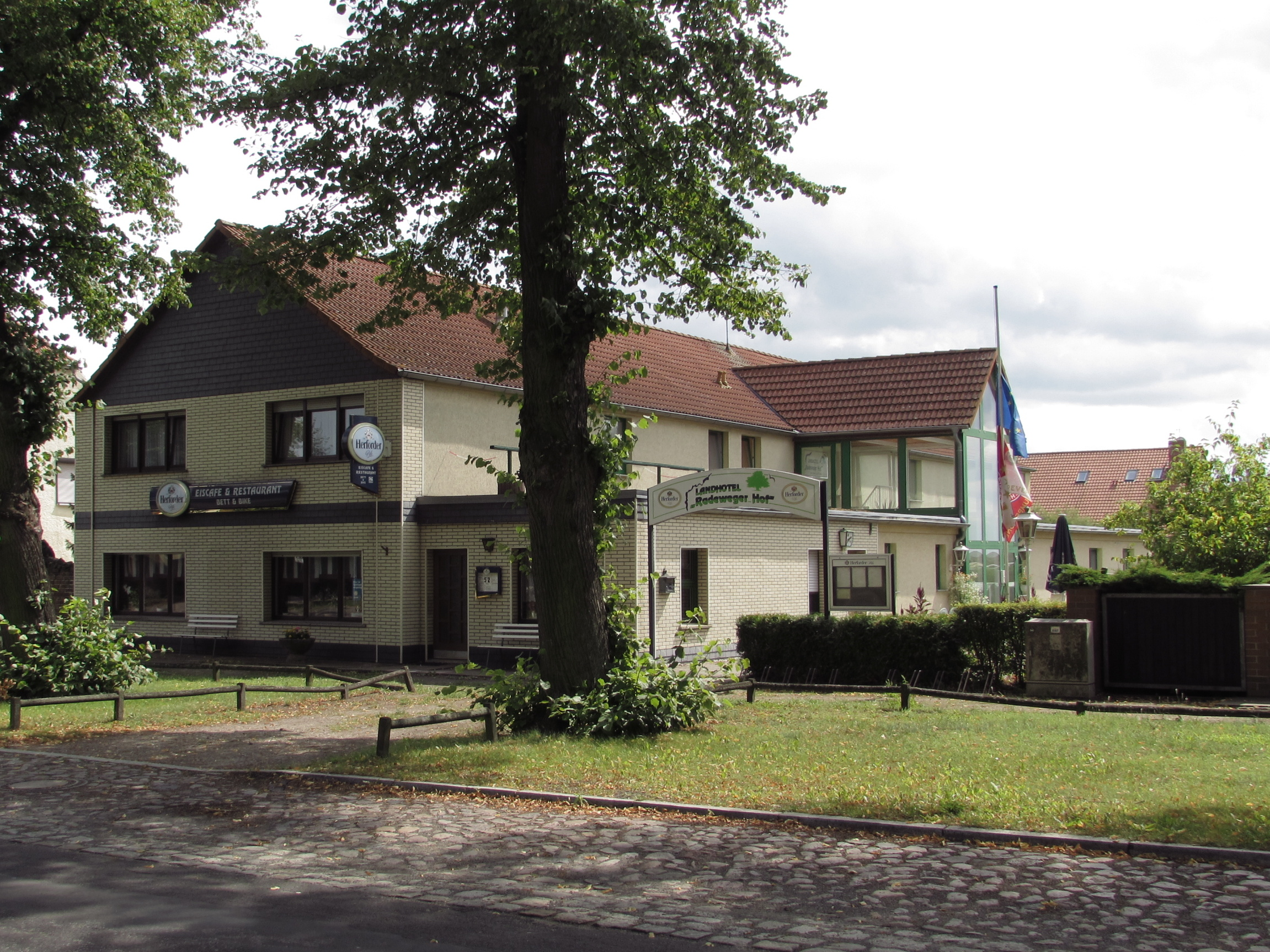 hotel im dorf radewege